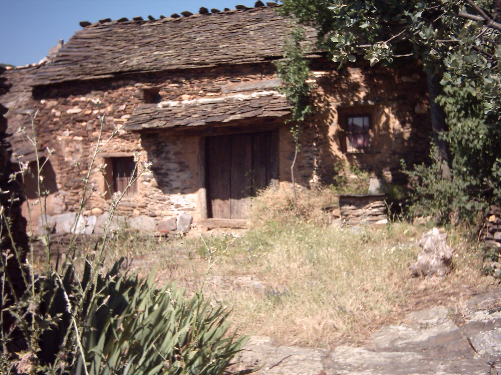 Ejemplo de una construcción de la llamada arquitectura "negra" de guadalajara